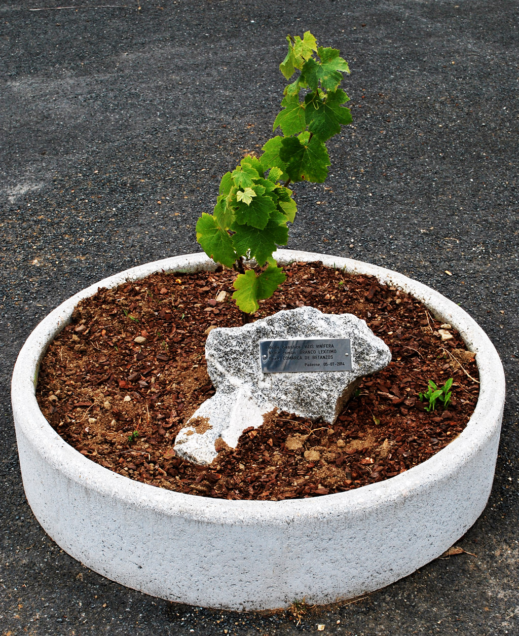 Cepa de Branco Lexítimo en Paderne